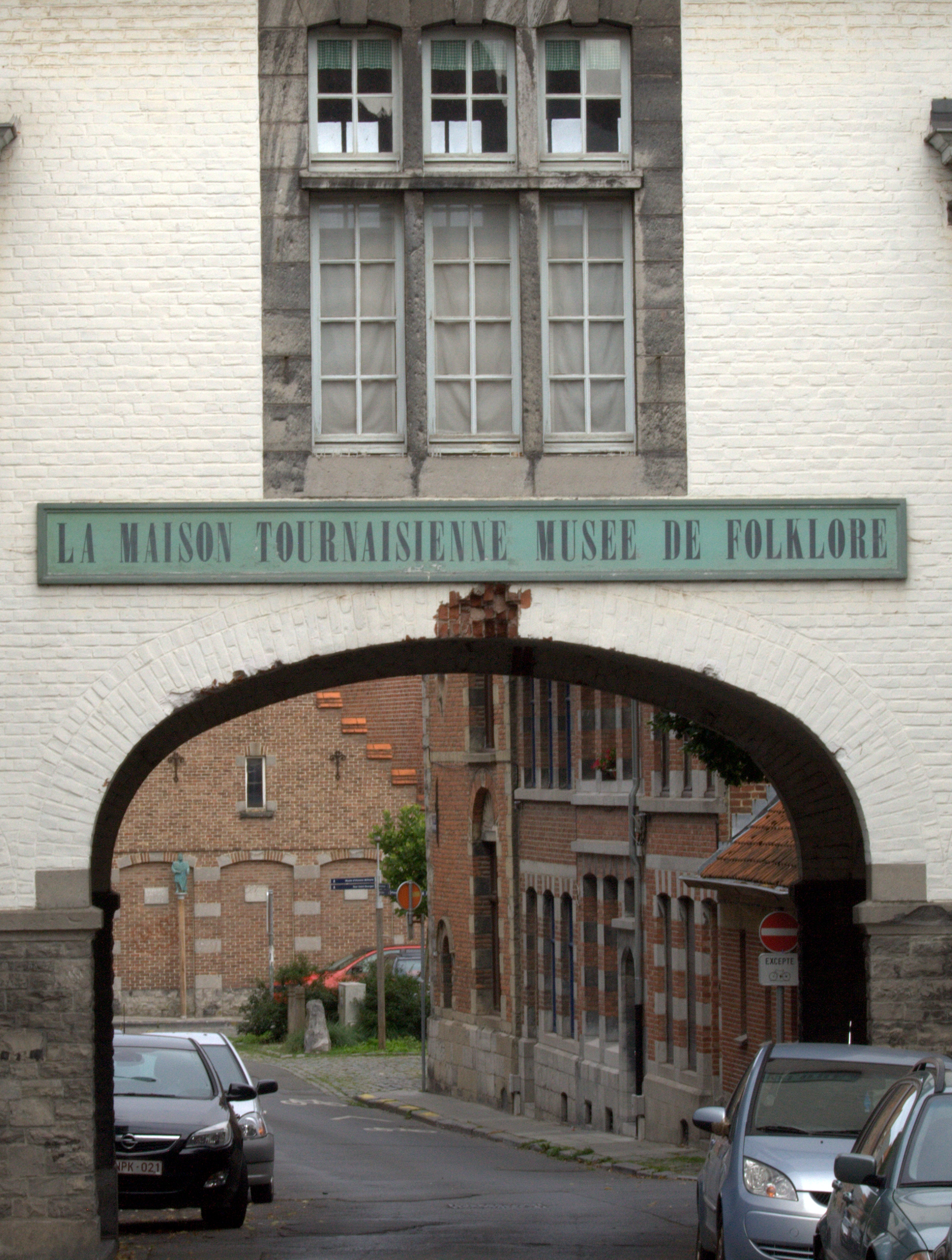 Façade arrière de la maison tournaisienne / musée du folklore